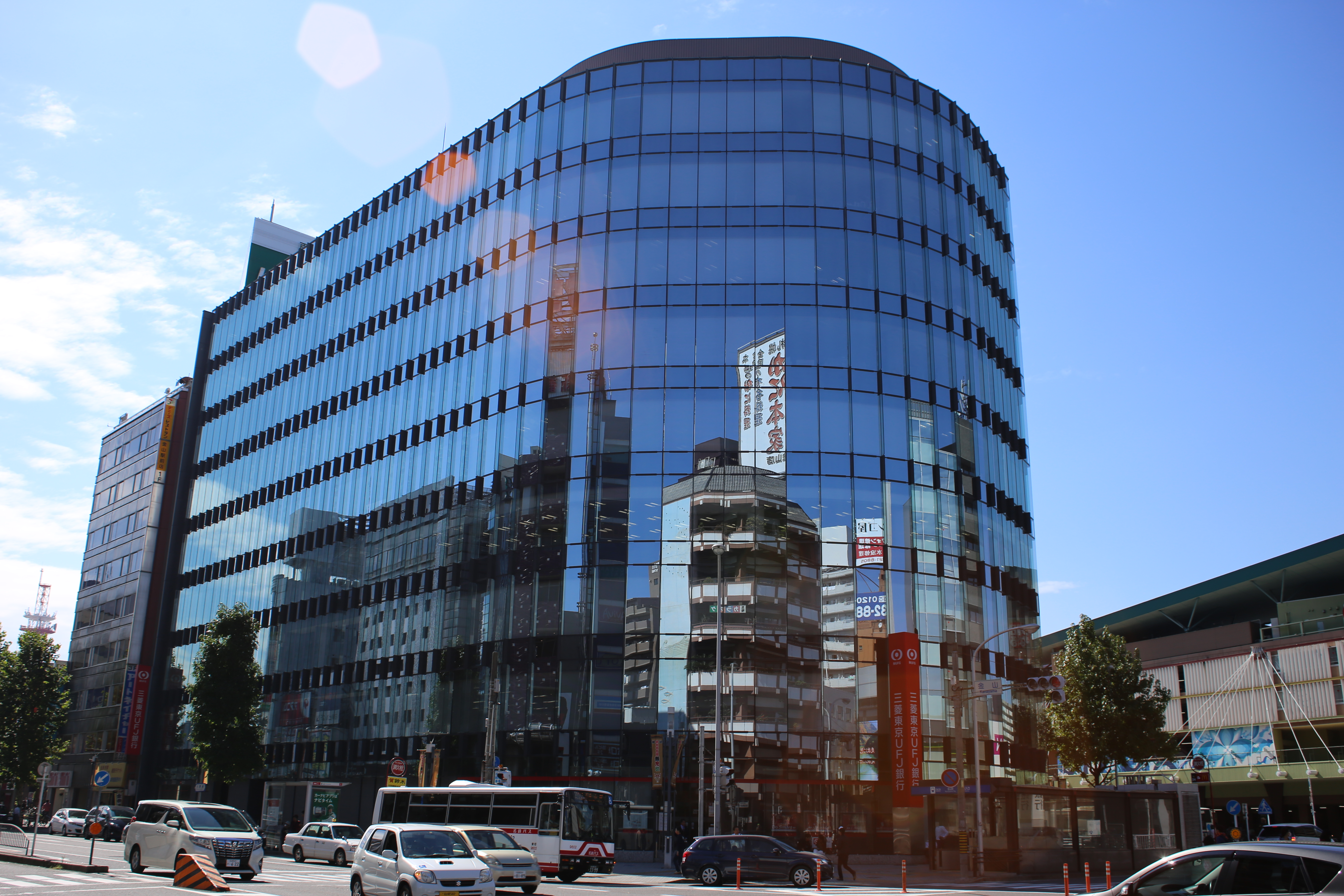 名古屋市中区金山一丁目のA-Placeを東側公道北側より撮影